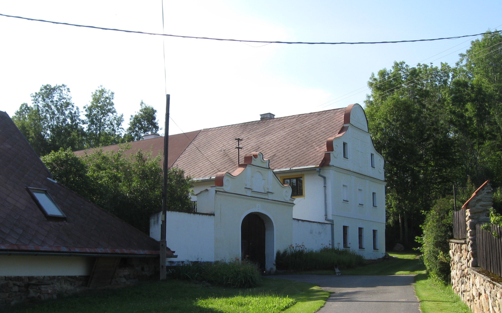 Venkovská usedlost (Libotyně), Libotyně 6.